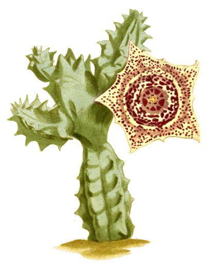 Illustration of Huernia guttata (Orig. Stapelia lentiginosa)